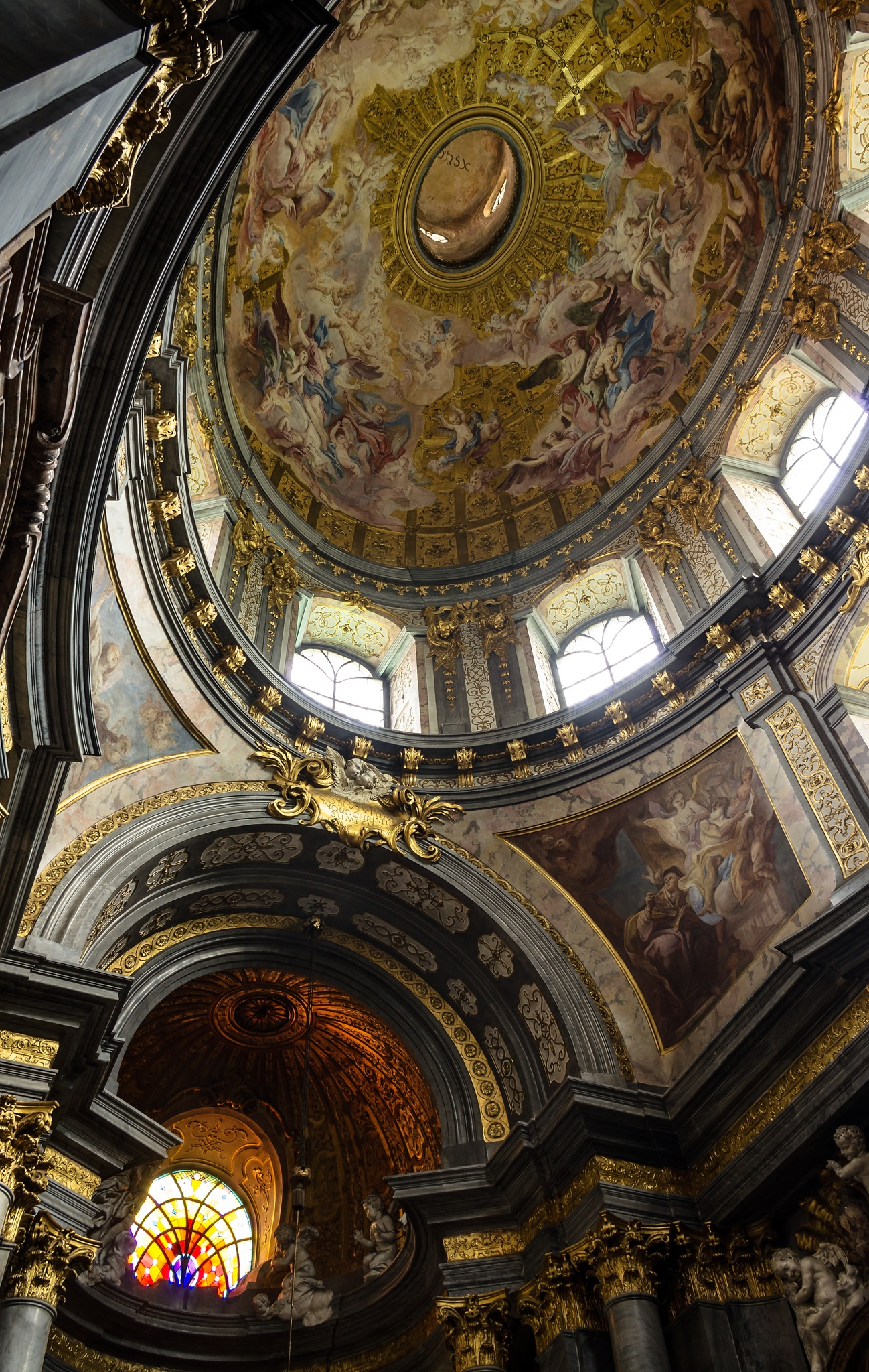 Katedra św. Jana Chrzciciela we Wrocławiu, kaplica Bożego Ciała